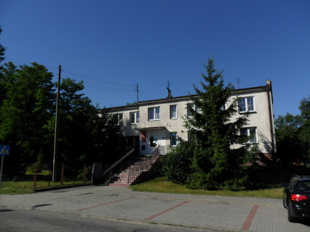 Ośrodek Zdrowia w Stargardzie Gubińskim.